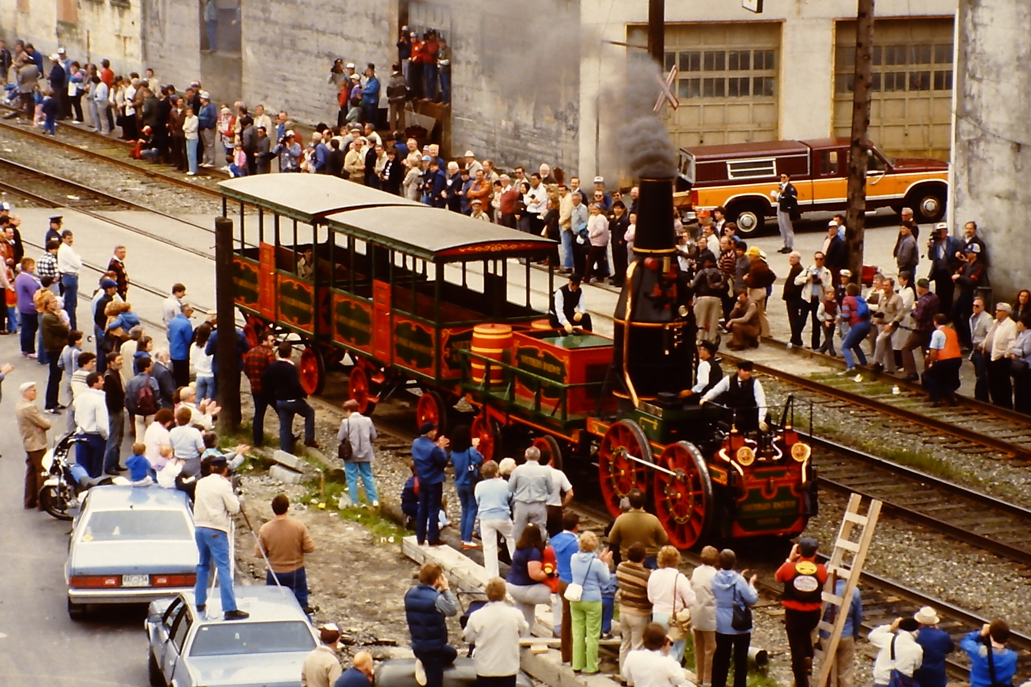 Dampflokomotive Best Friend of Charleston auf der SteamExpo 86